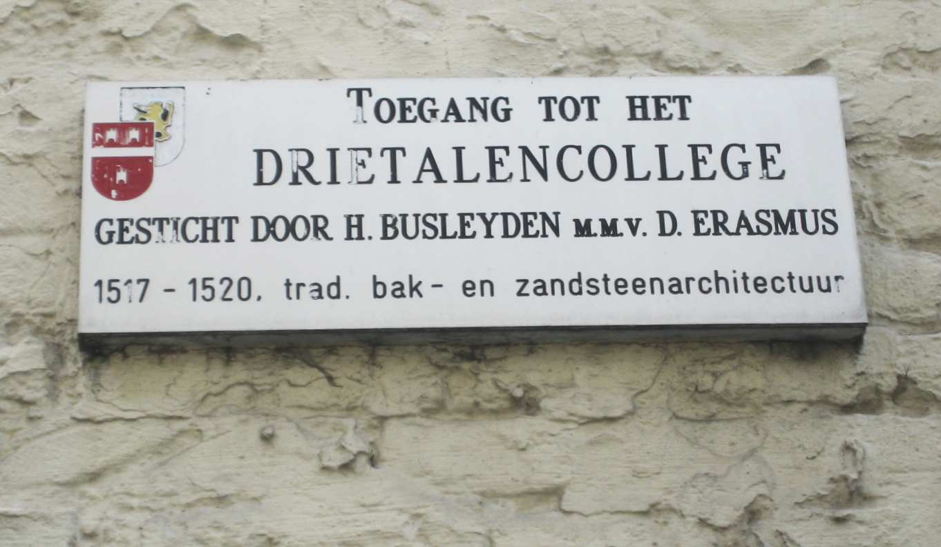 Plack am Busleidengang zu Léiwen, fir un de Collegium Trilingue z'erënneren. Oktober 2007.